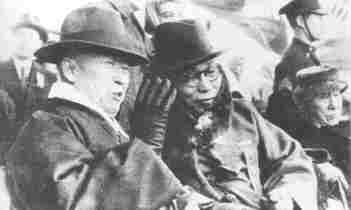 임시정부 요인 환영회에 참석한 이승만과 김구